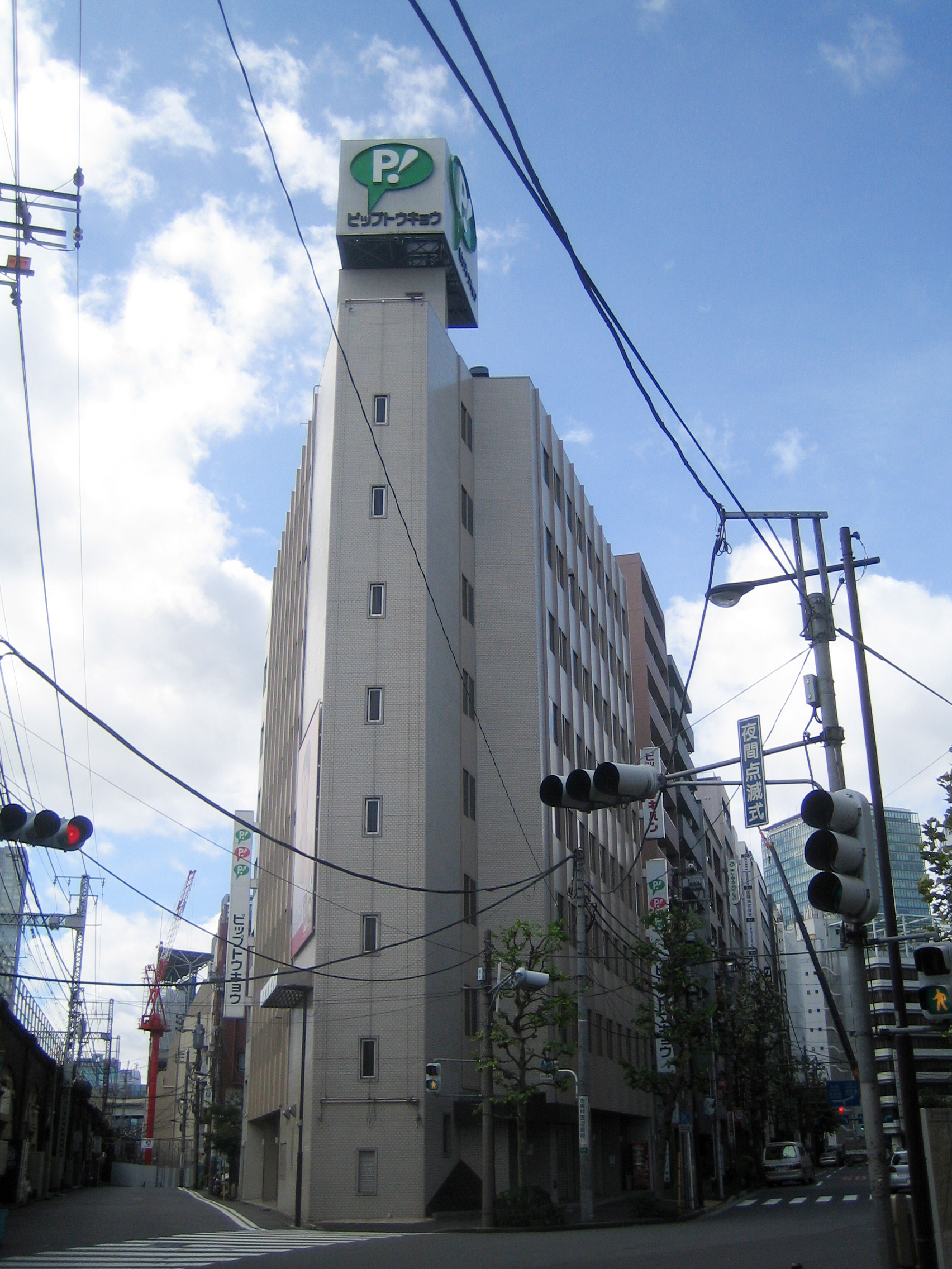 ピップトウキョウ本社。東京都千代田区内神田 PIP-TOKYO Co., Ltd. (ピップトウキョウ), at Uchikanda, Chiyoda, Tokyo, Japan